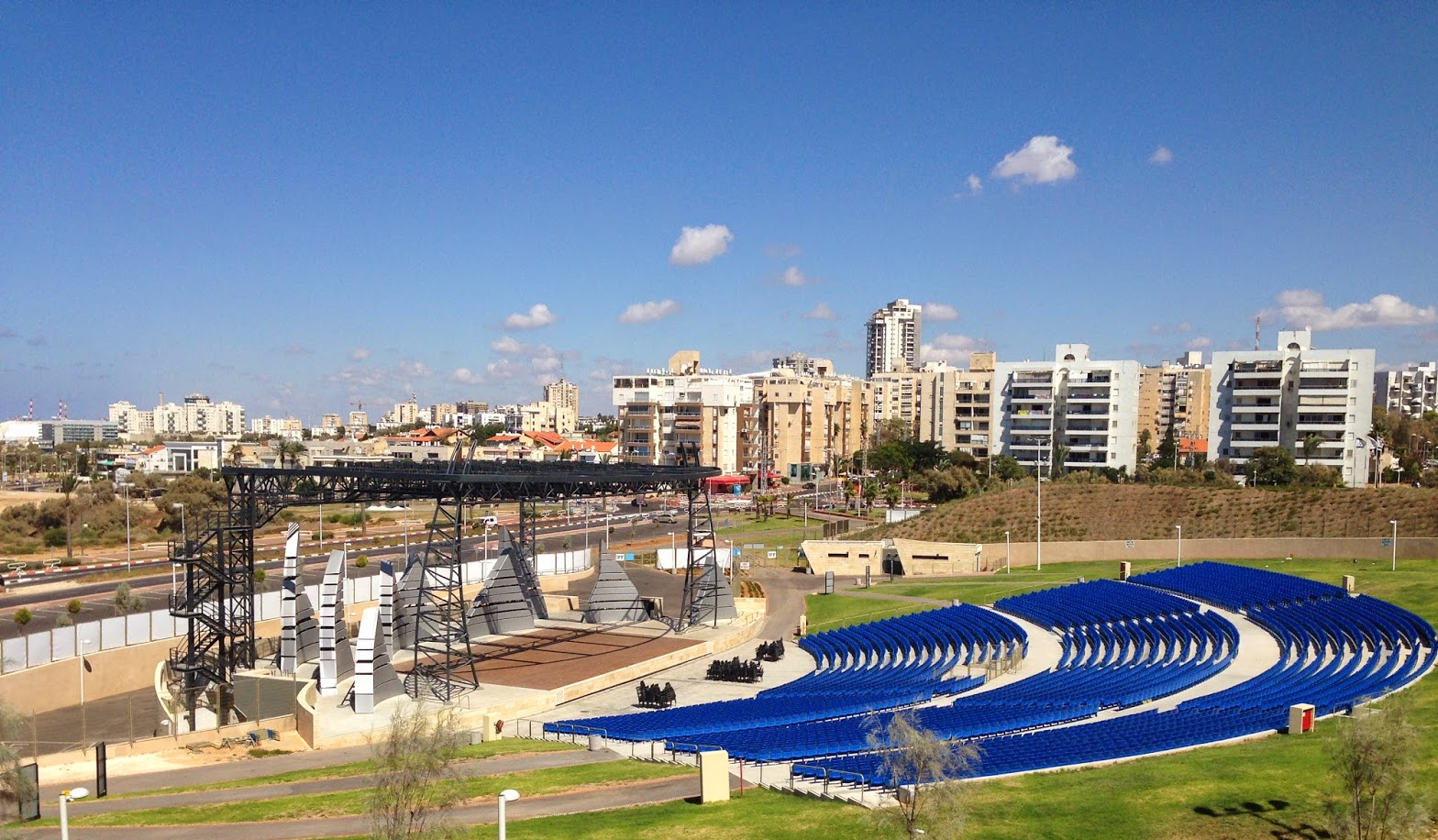 אמפי-פארק אשדוד ים במבט מגן הסלעים.